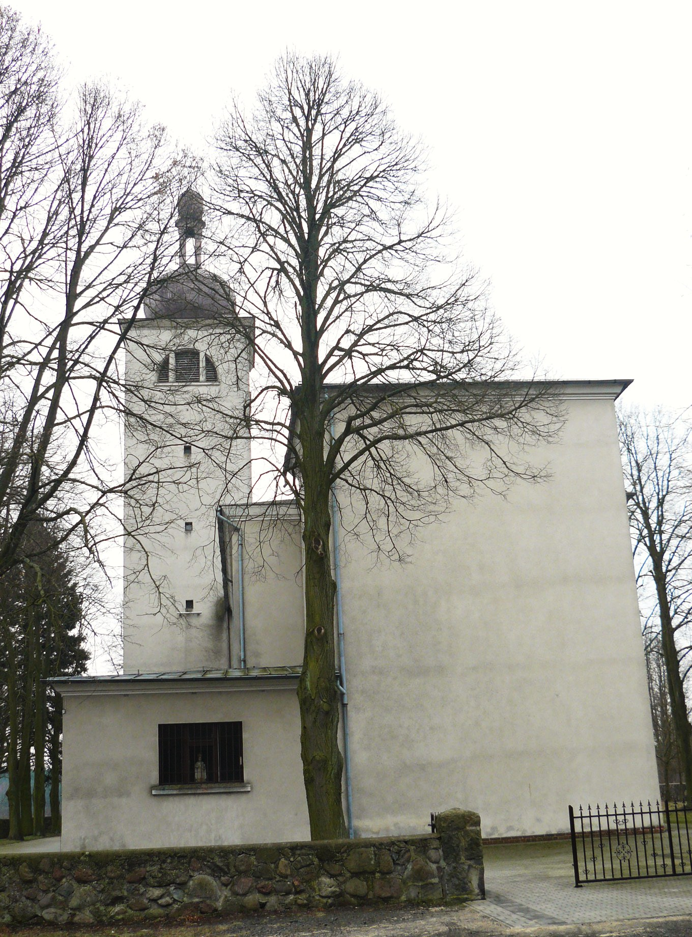 Kościół NSJ i św. Anny w Kiszewie.